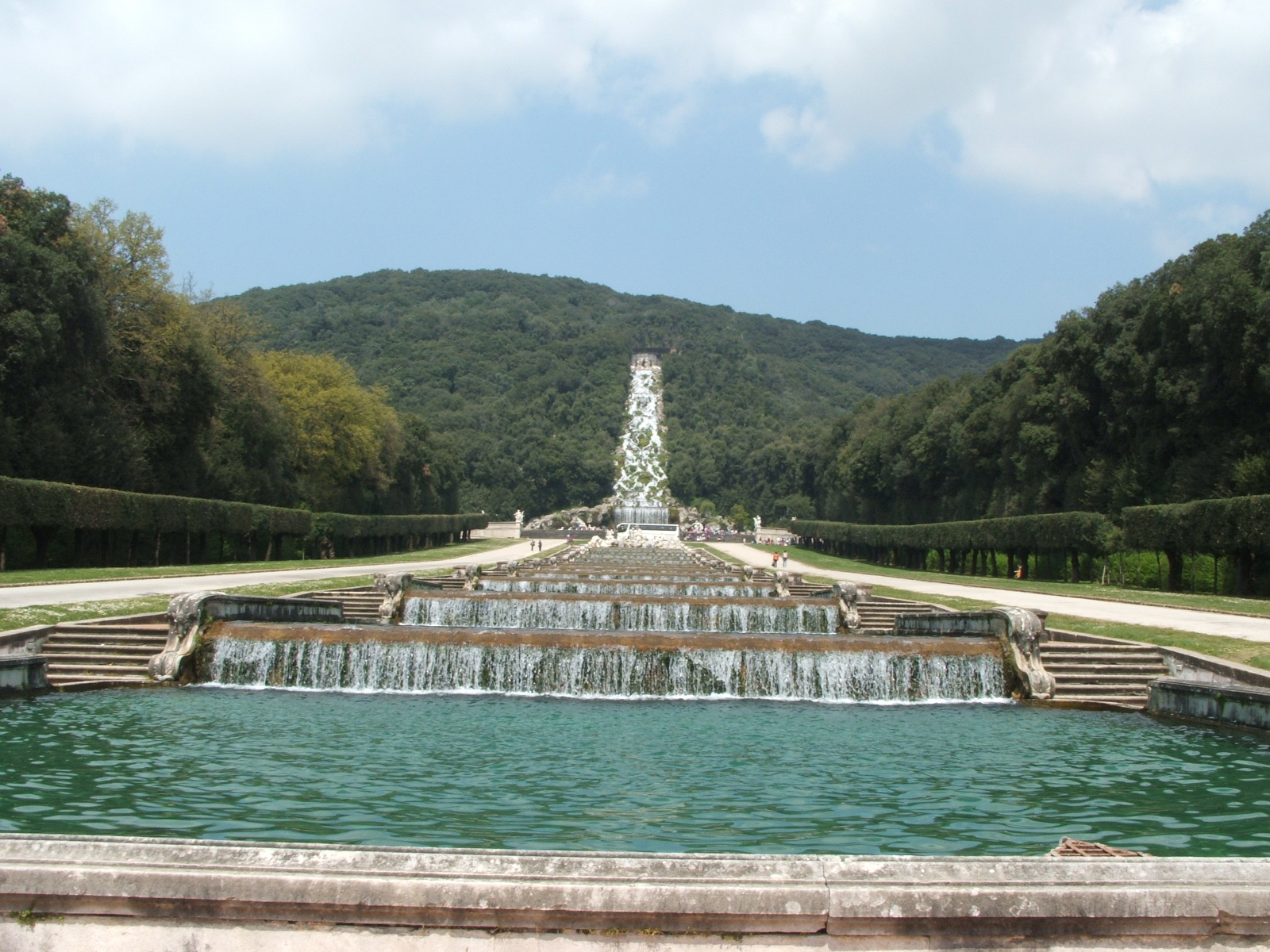 Immagine dalla Reggia di Caserta, Caserta, Campania, Italia. Statue e fontane nel parco